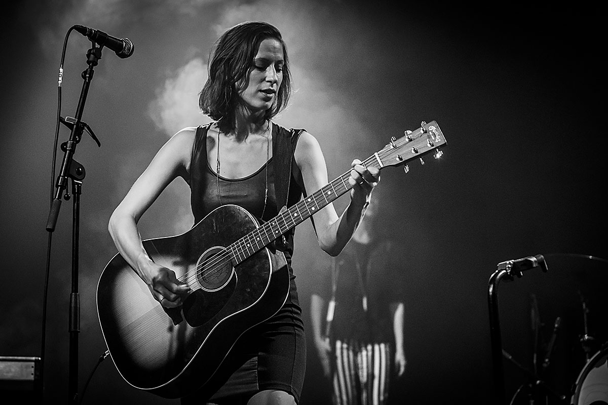 Mathilde Falch spiller på spillestedet Forbrændingen 13/9-14